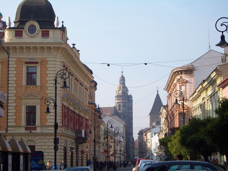 Mlynská ulica102_0407